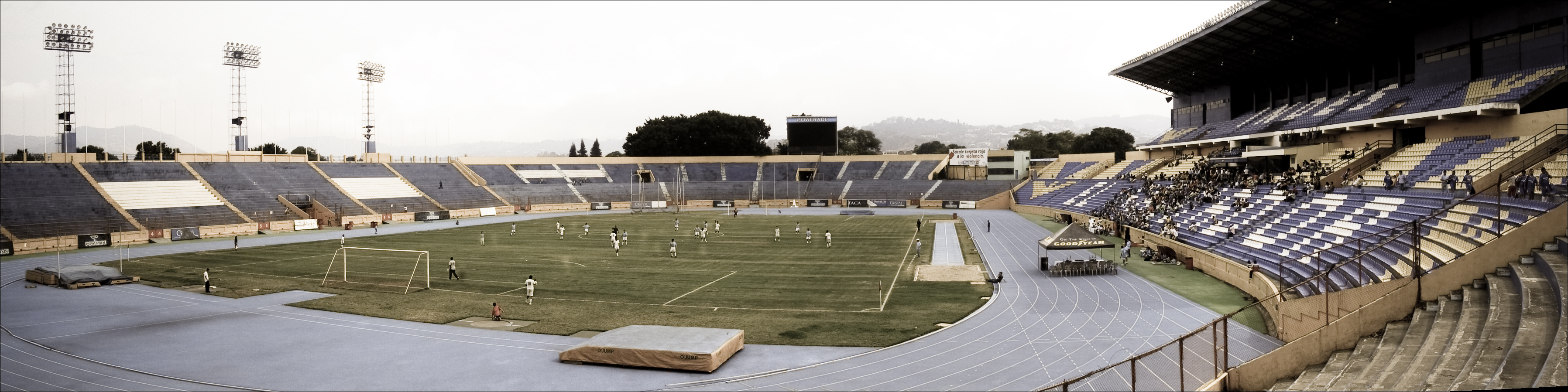 En la inauguración del torneo de fútbol de la empresa.